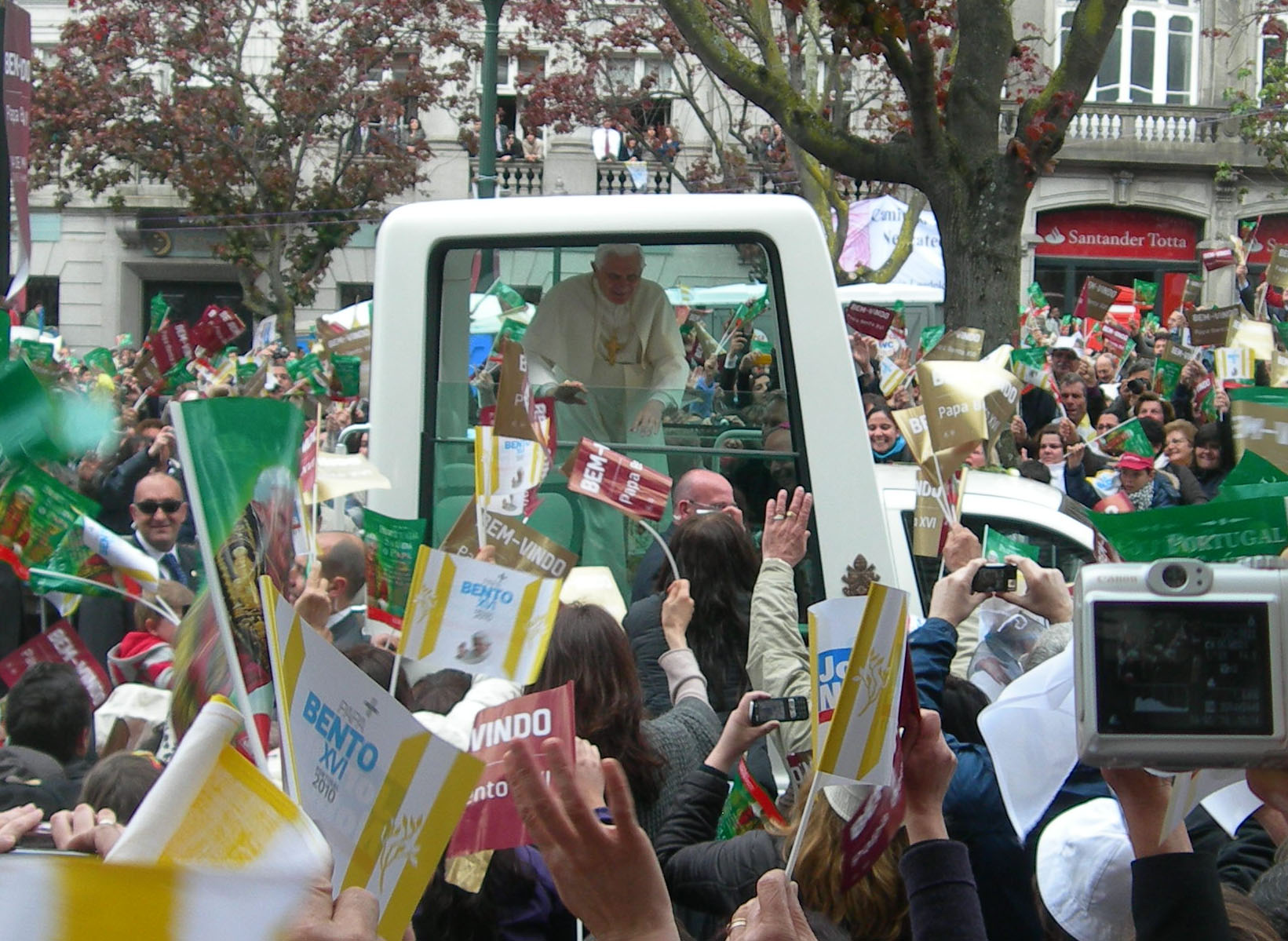 O Papa Bento XVI em visita ao Porto, 14 de Maio de 2010. Por muita sorte, o carro papamóvel parou bem na minha frente, o Papa abaixou o vidro, para beijar um bebé entregue pela mãe.